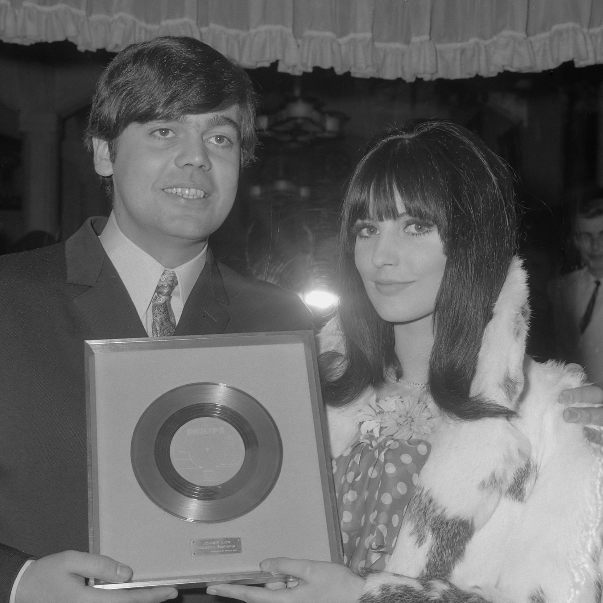 Gouden plaat voor Johnny Lion , voor zijn plaat Sophietje , Sophietje naast Johnny 24 februari 1966